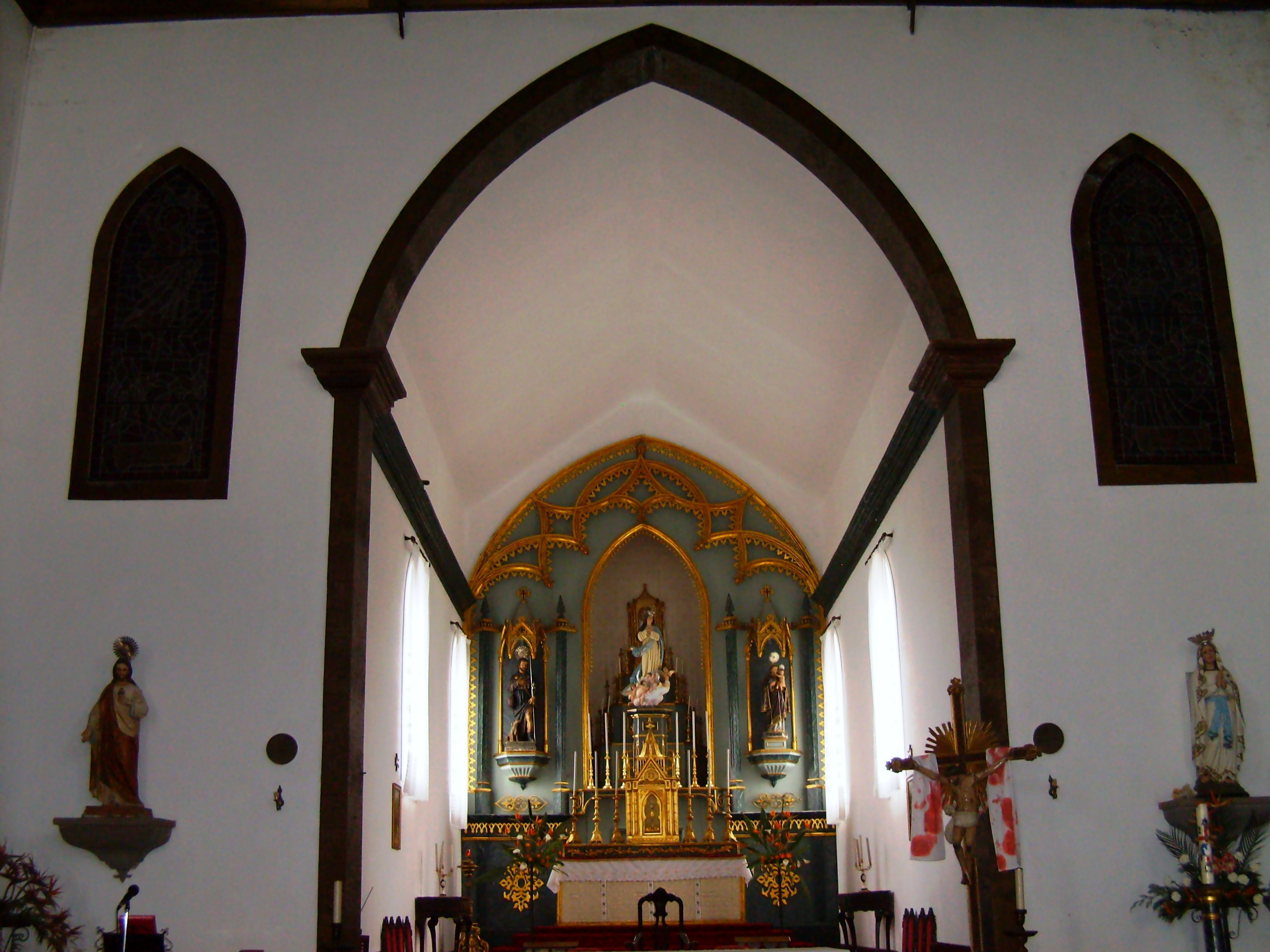 Igreja de São Roque dos Altares, Altares, Angra do Heroísmo, Ilha Terceira, Açores: interior.